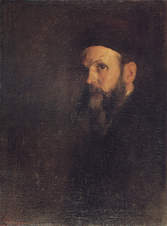 António Teixeira Carneiro Júnior (1872 - 1930) foi um pintor português